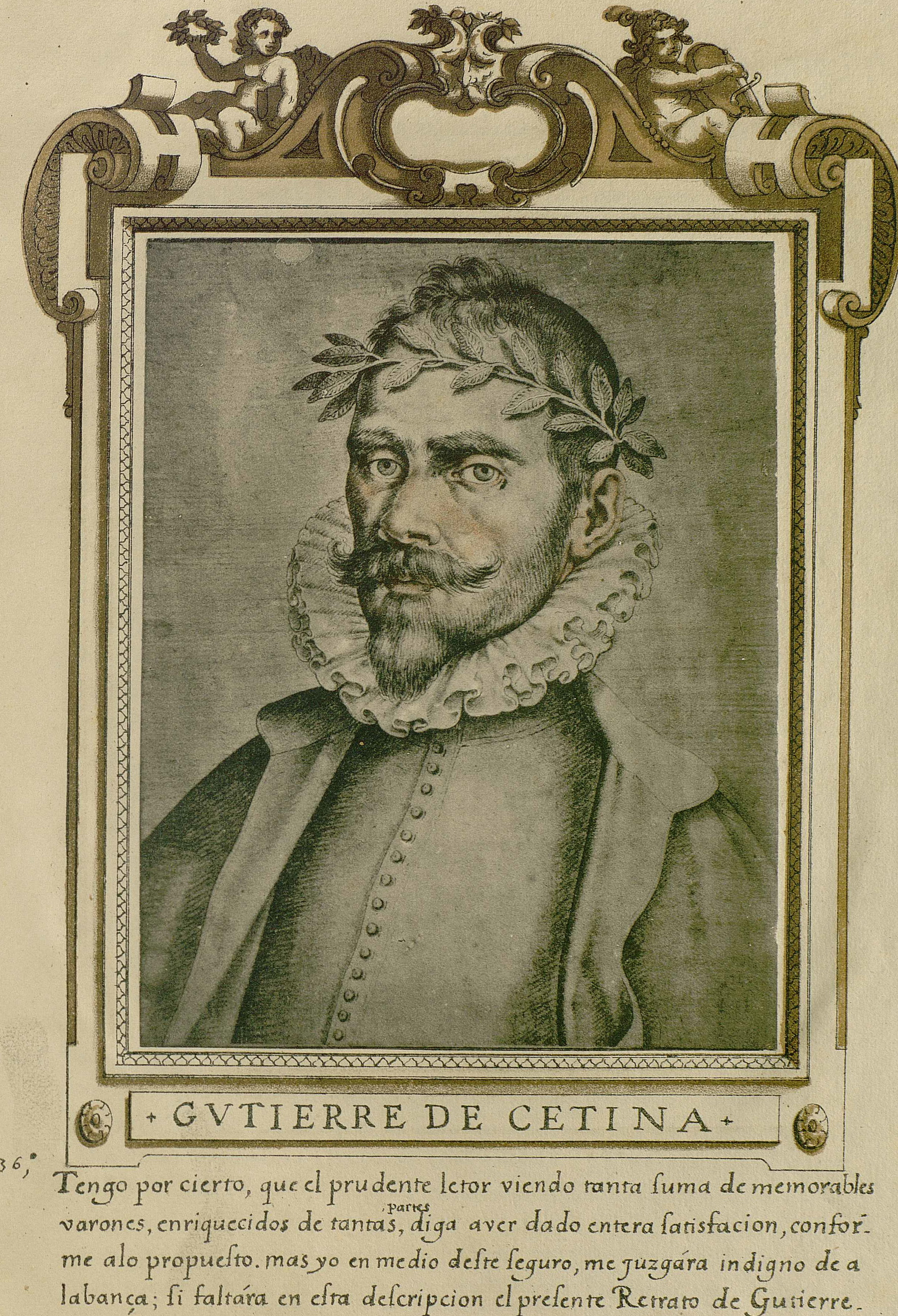 Gutierre de Cetina, Libro de descripción de verdaderos retratos de ilustres y memorables varones, Madrid, Biblioteca de la Fundación Lázaro Galdiano